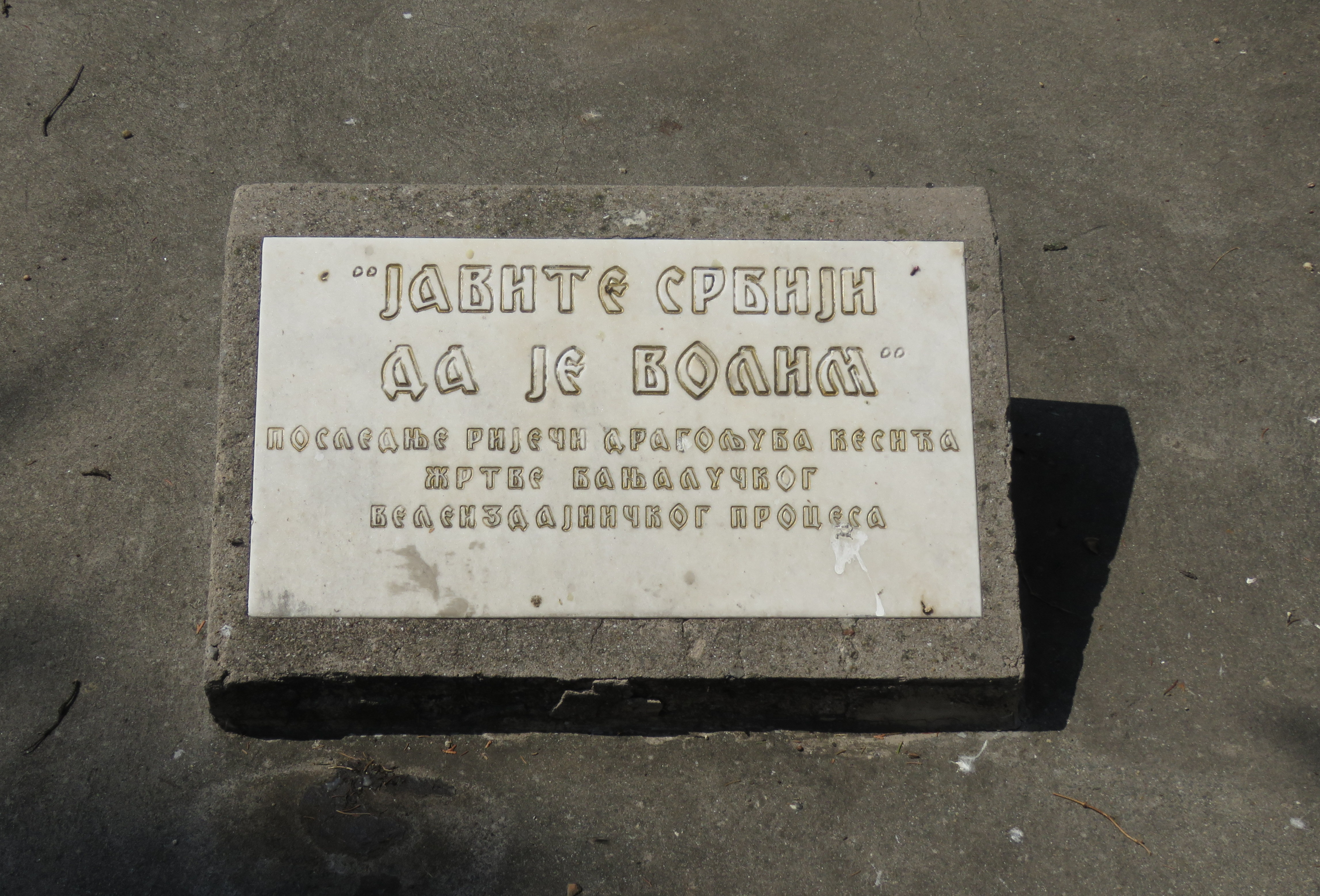 Православно гробље "Свети Пантелија", Бања Лука, Споменик жртвама велеиздајничког процеса, стари надгробници, NKD114